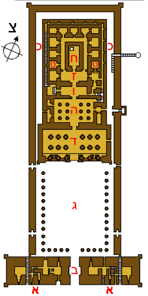 מפה של מקדש אדפו עם סימון אותיות בעברית